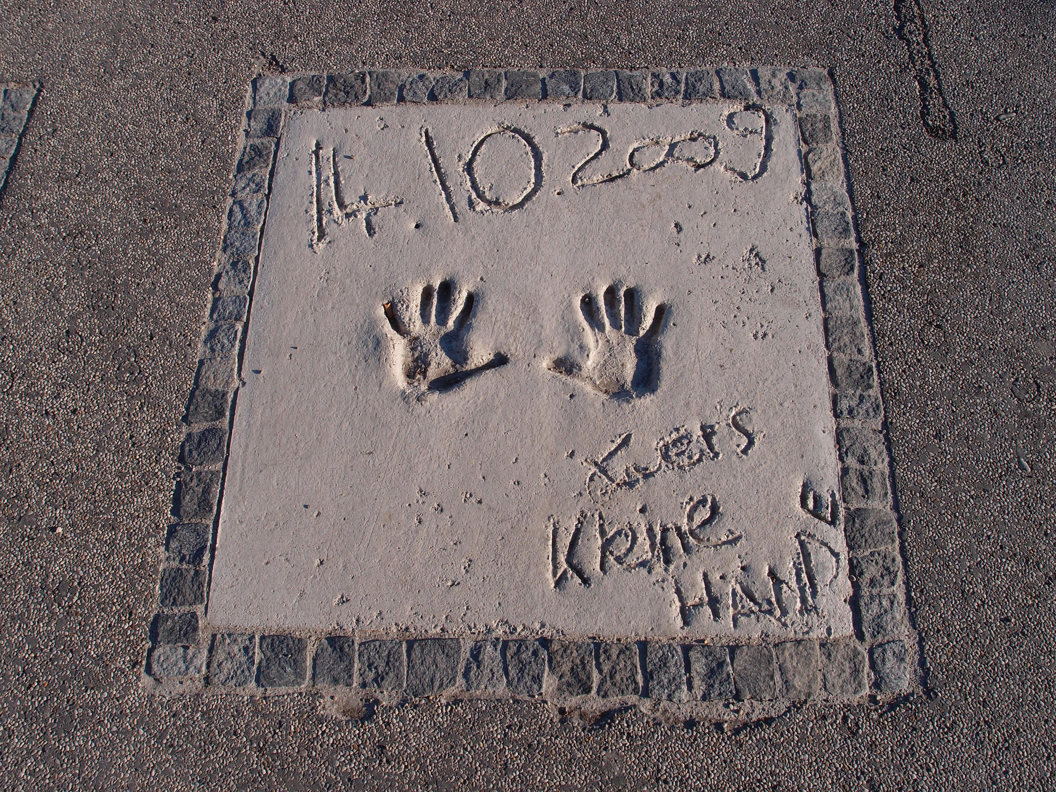 Xavier Naidoo (Handabdrücke); Munich Olympic Walk of Stars, München, Olympiapark